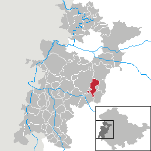 Schweina in Thuringia - Wartburgkreis